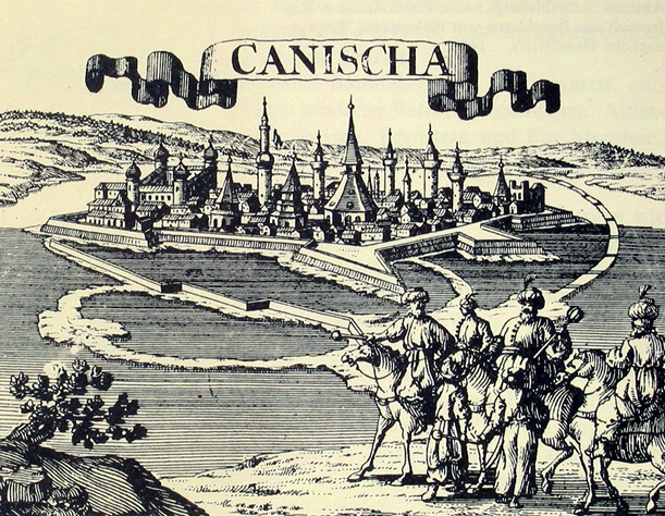 Canischa (Nagykanizsa) im 17. Jahrhundert